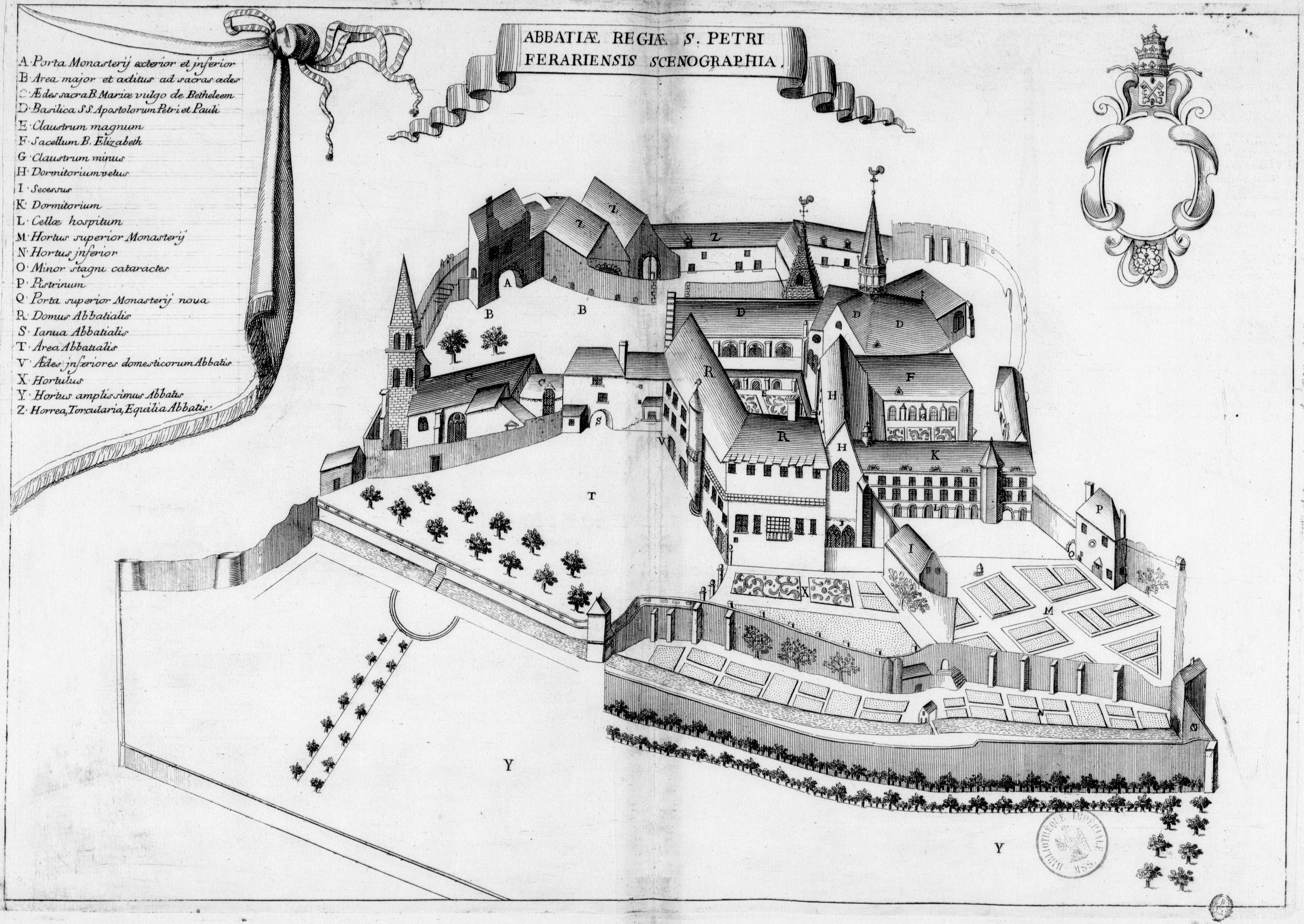 Planche gravée du 17ème siècle représentant l'abbaye de Ferrières, en France, dans le livre Monasticon Gallicanum.